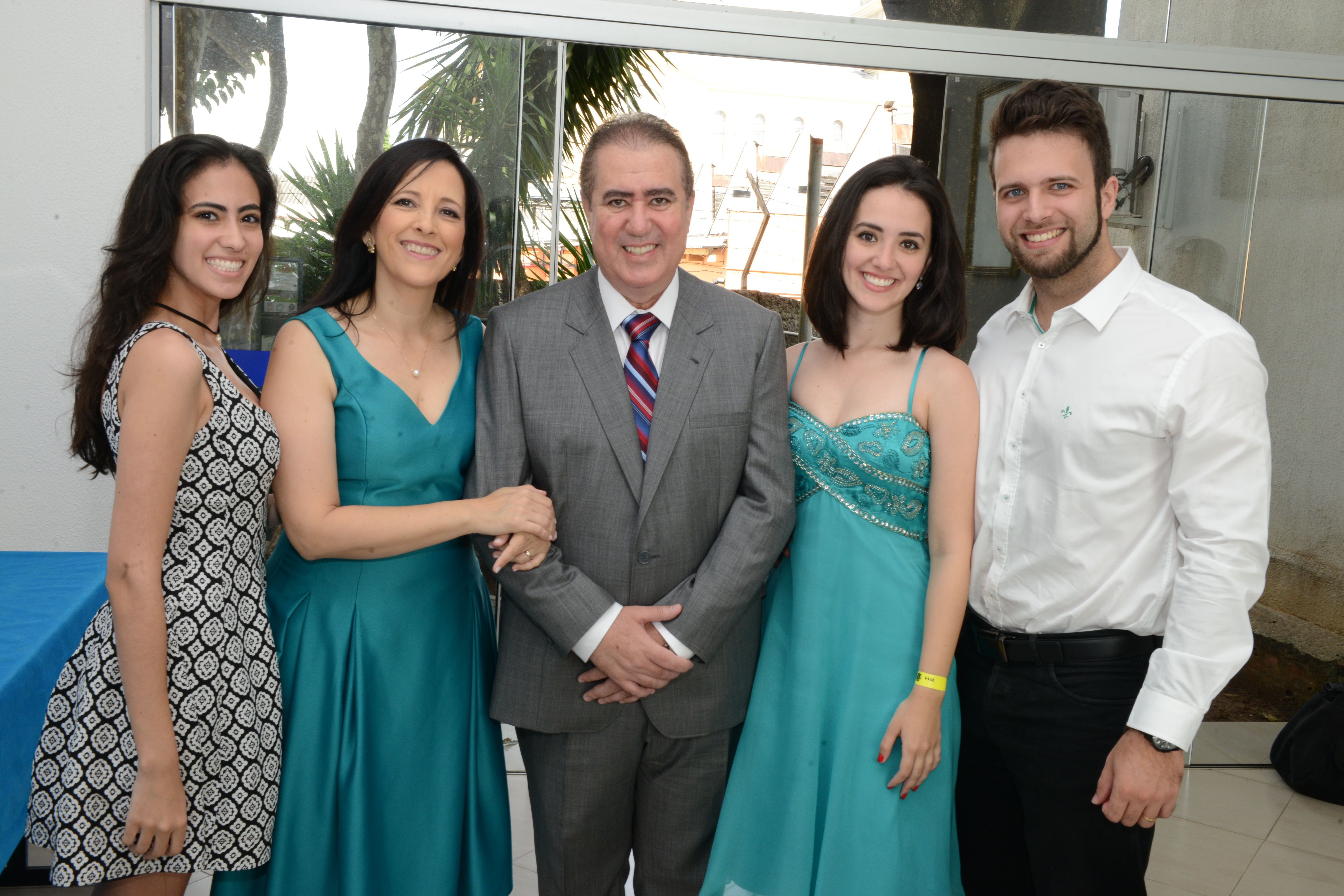 Foto Carlos Bassan